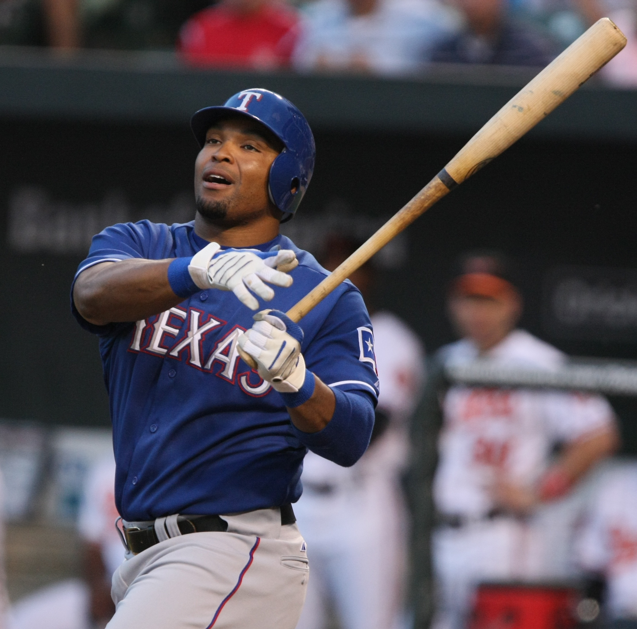 Marlon Byrd